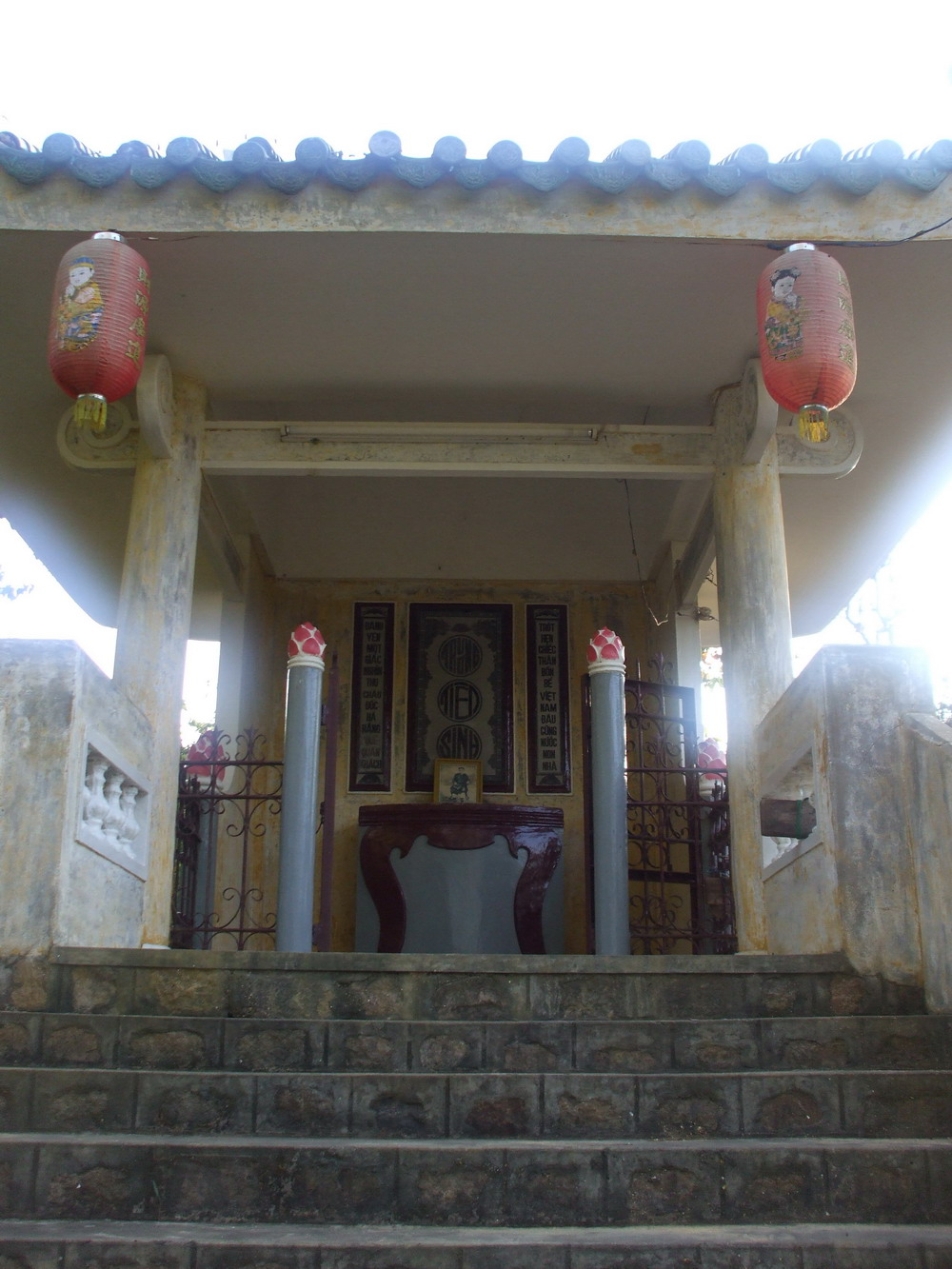 Đền thờ chí sĩ Trương Gia Mô trên đỉnh núi Sam (Châu Đốc, An Giang, Việt Nam).